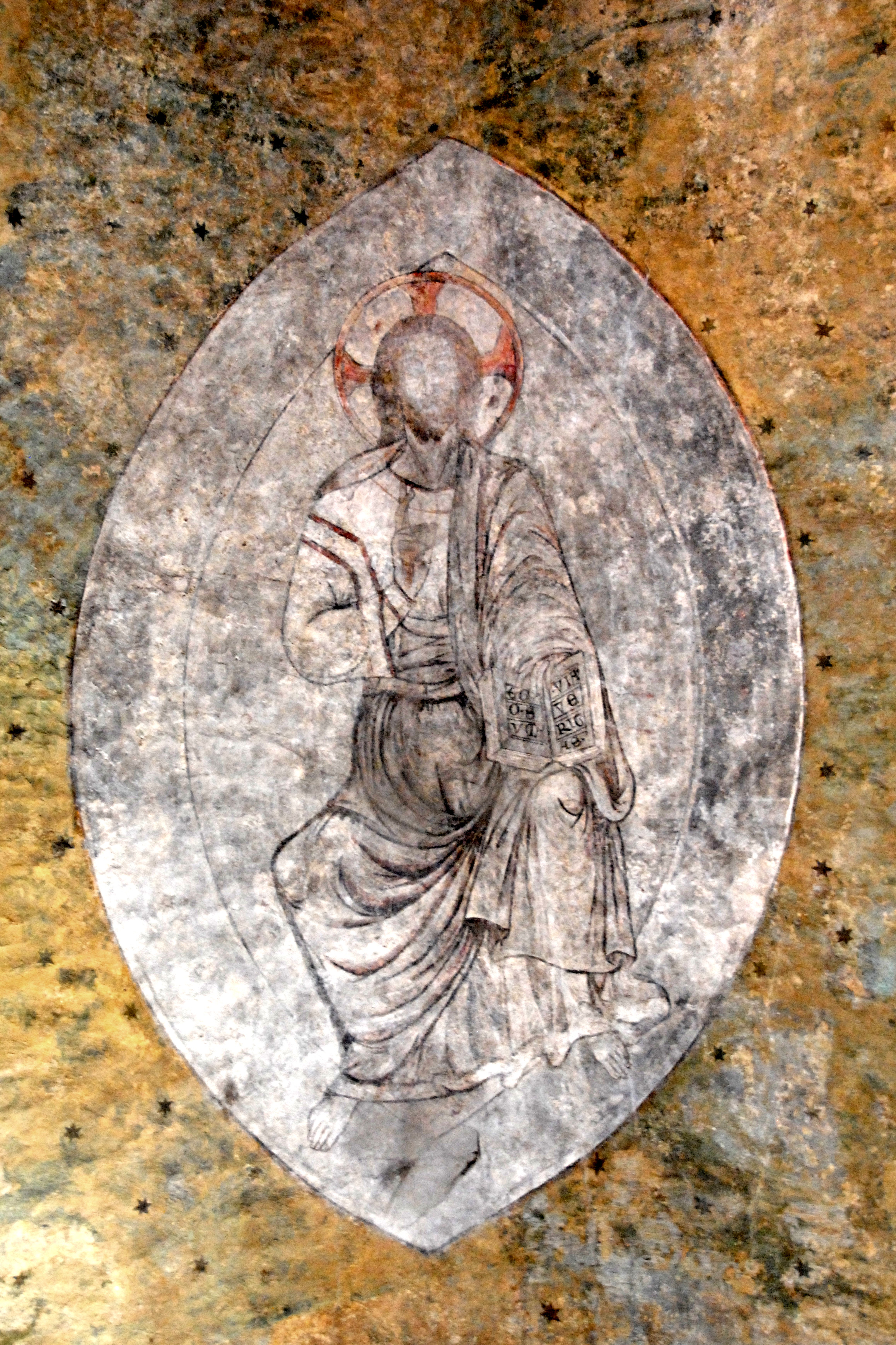 Kirche St.-André Lavaudieu, Gewölbemitte, Christus in der Mandorla